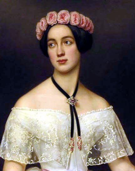 Joseph Karl Stieler: Prinzessin Elisabeth von Sachsen-Altenburg (1826–1896) (cropped from Image:Joseph Karl Stieler 001.jpg)